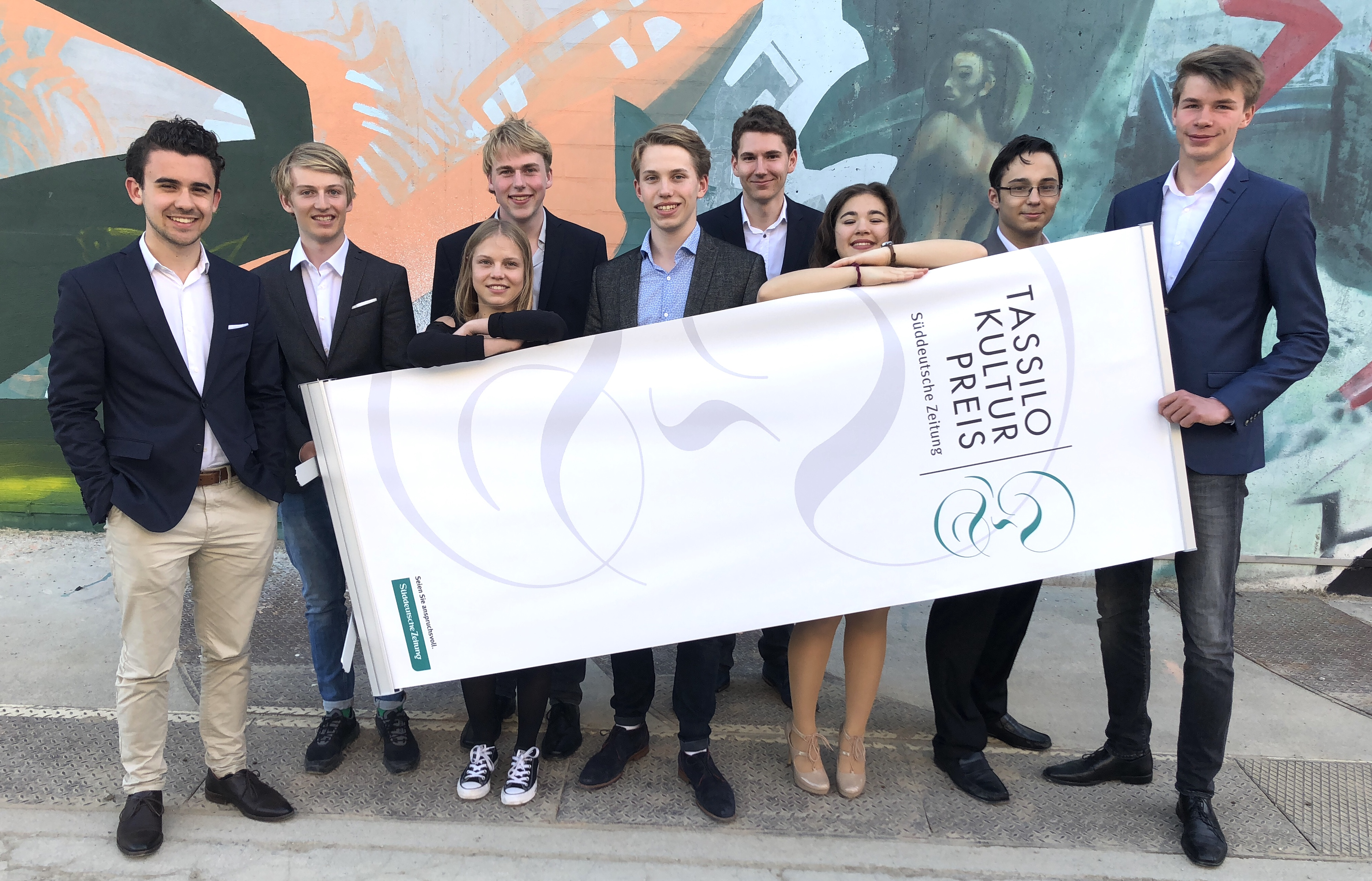 Im Münchner Werkviertel gewann das Team MovieJam Studios den Kulturpreis der Süddeutschen Zeitung 2018/19.